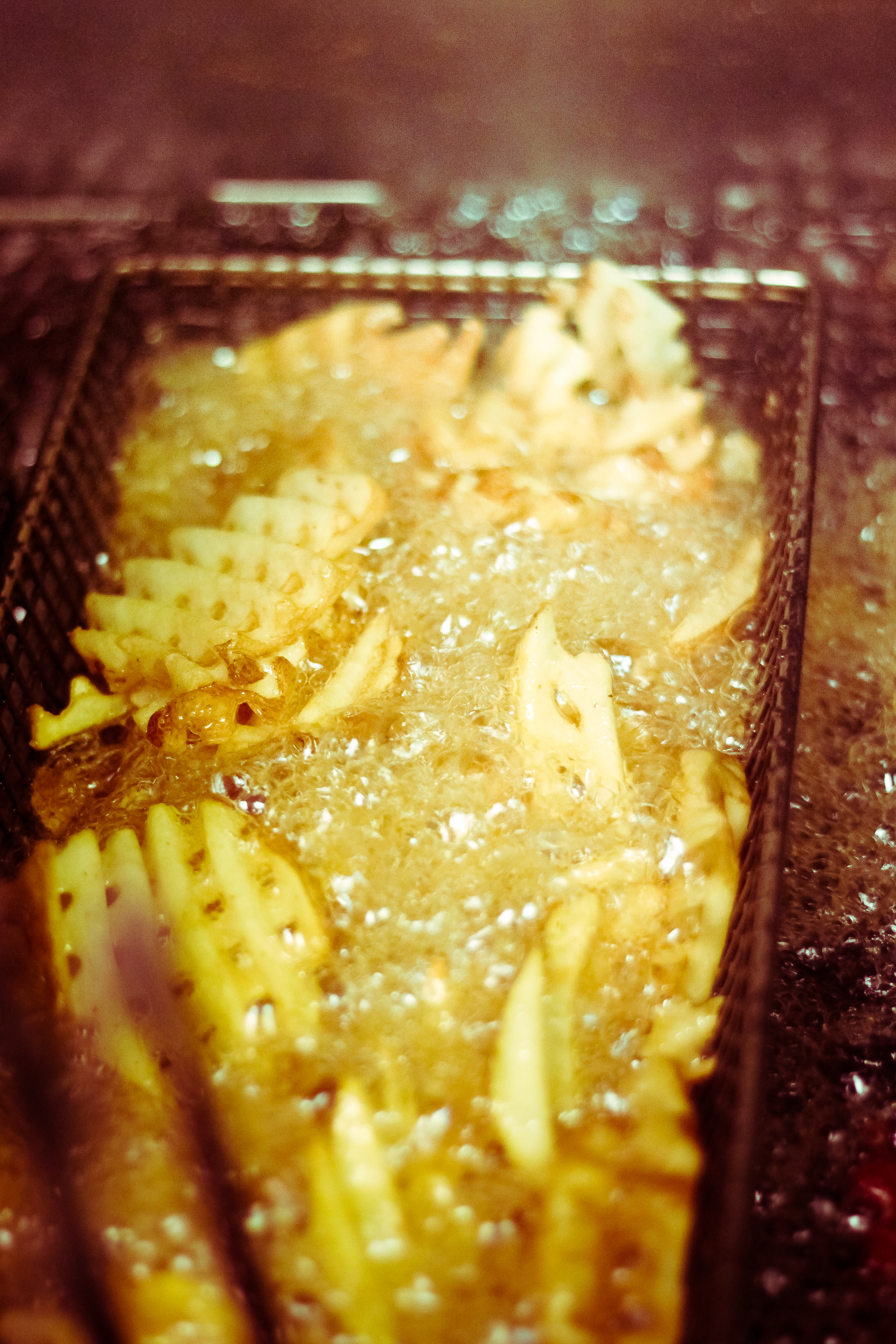 So delicious.